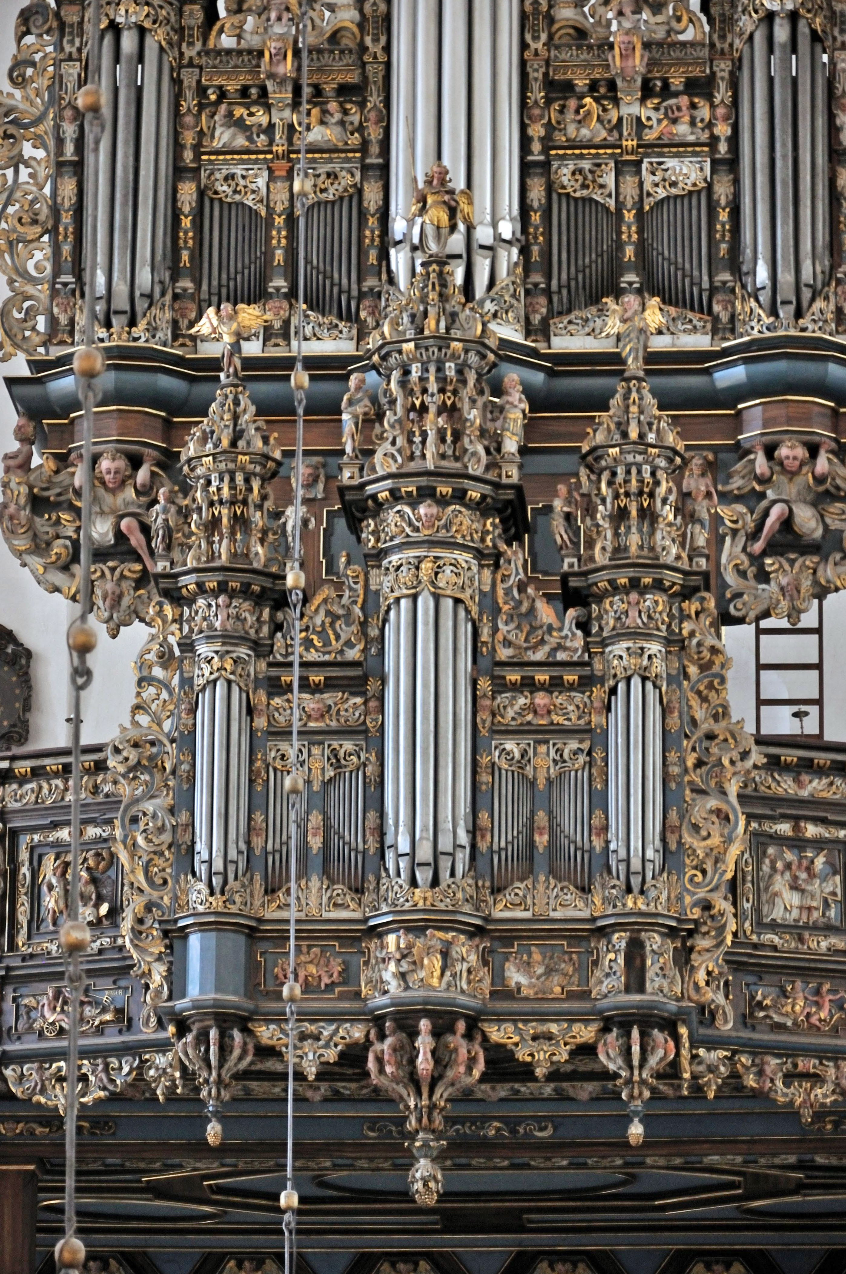 Orgel der Marienkirche Danzig, Polen